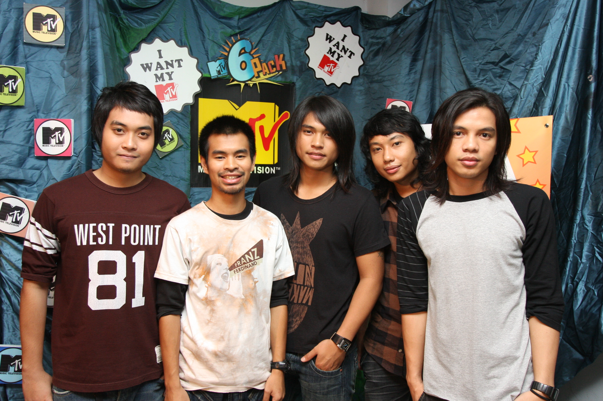 I-nam (ไอน้ำ) Thai band